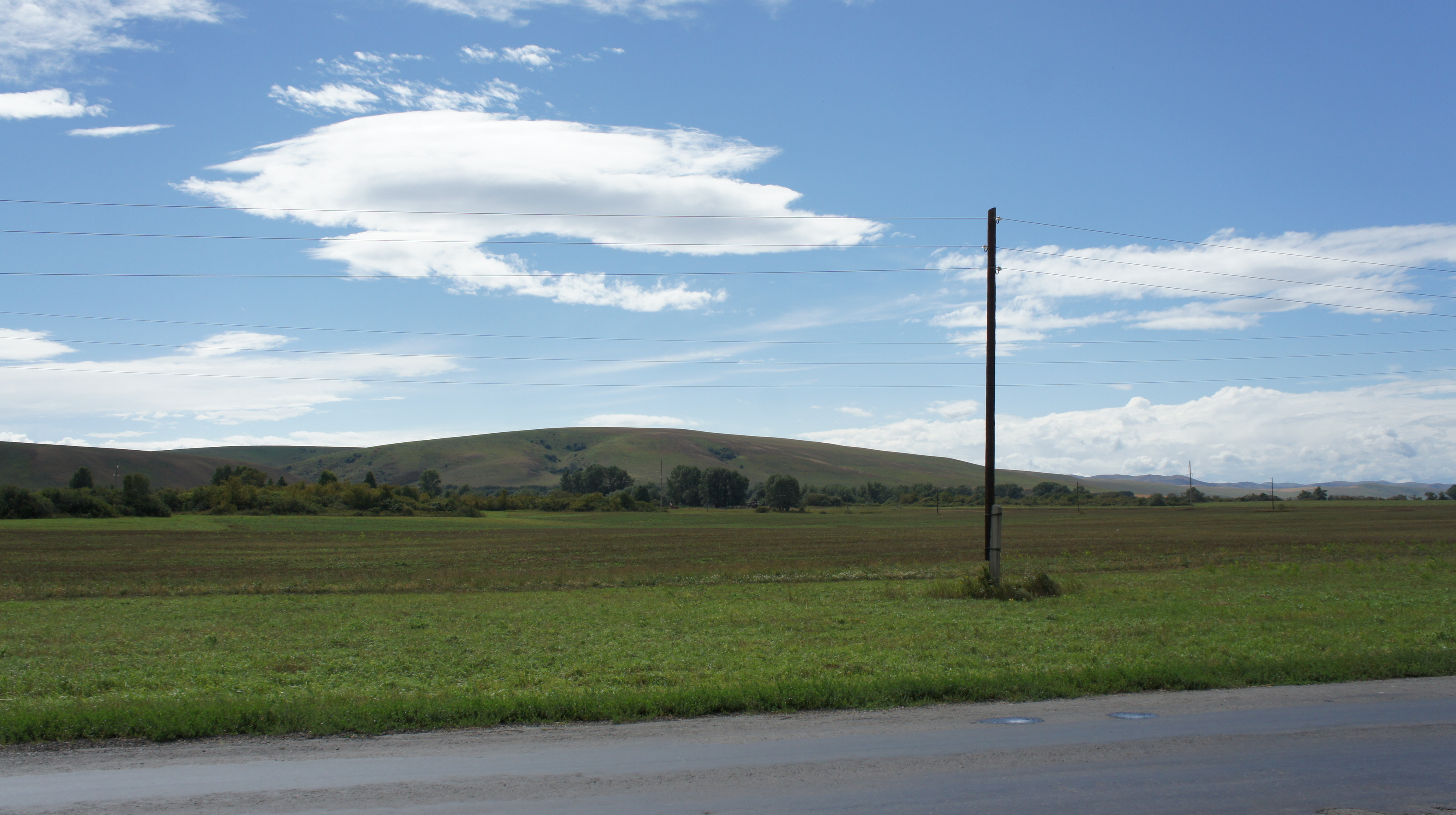 Типичный пейзаж Петропавловского района Алтайского края